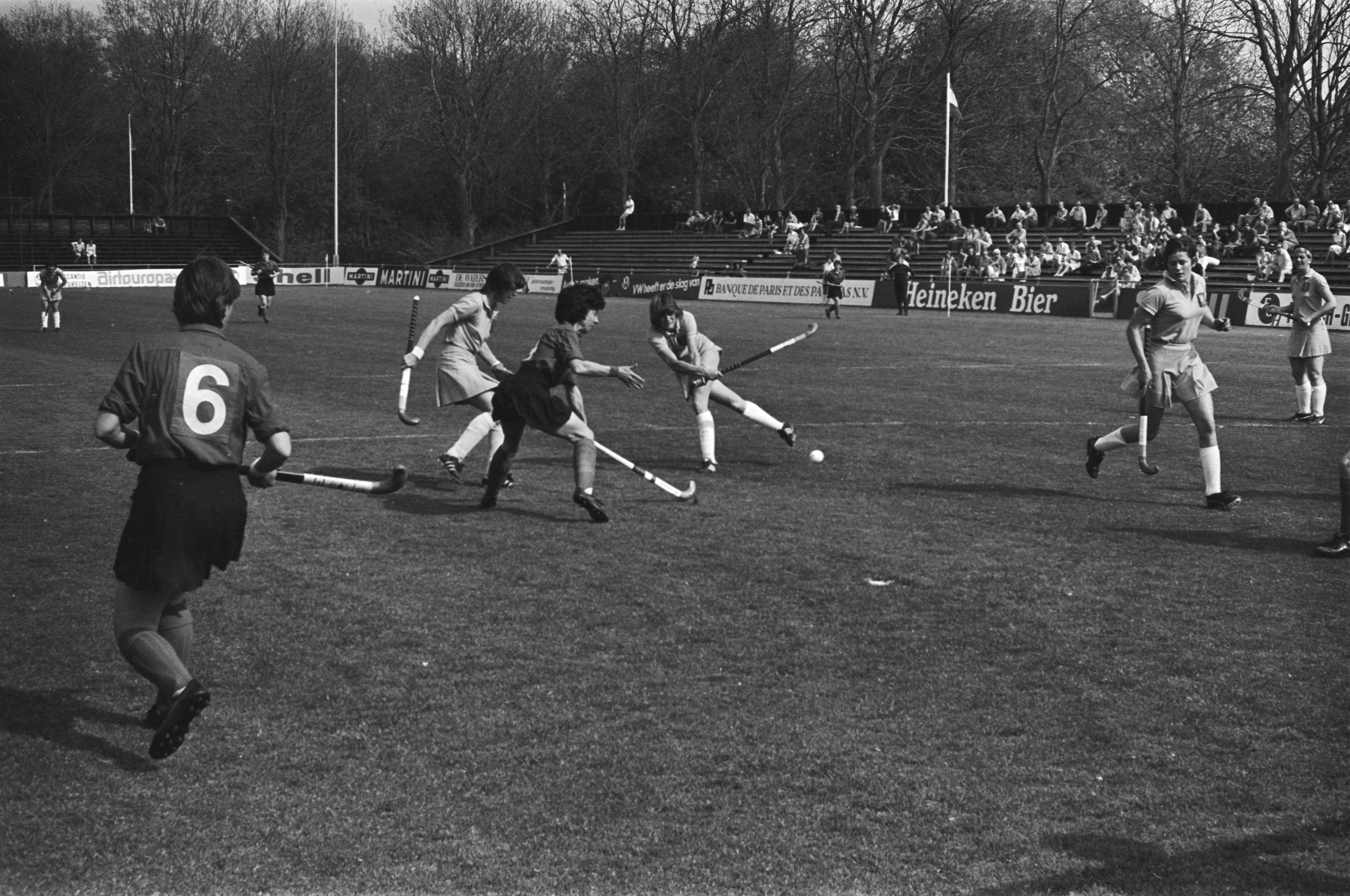 Collectie / Archief : Fotocollectie Anefo Reportage / Serie : [ onbekend ] Beschrijving : Dameshockeyinterland Nederland tegen Wales, Loes Baks (rechts) scoort uit strafcorner Datum : 8 mei 1976 Locatie : Nederland, Wales Trefwoorden : hockey Fotograaf : Croes, Rob C. / Anefo Auteursrechthebbende : Nationaal Archief Materiaalsoort : Negatief (zwart/wit) Nummer archiefinventaris : bekijk toegang 2.24.01.05 Bestanddeelnummer : 928-5650